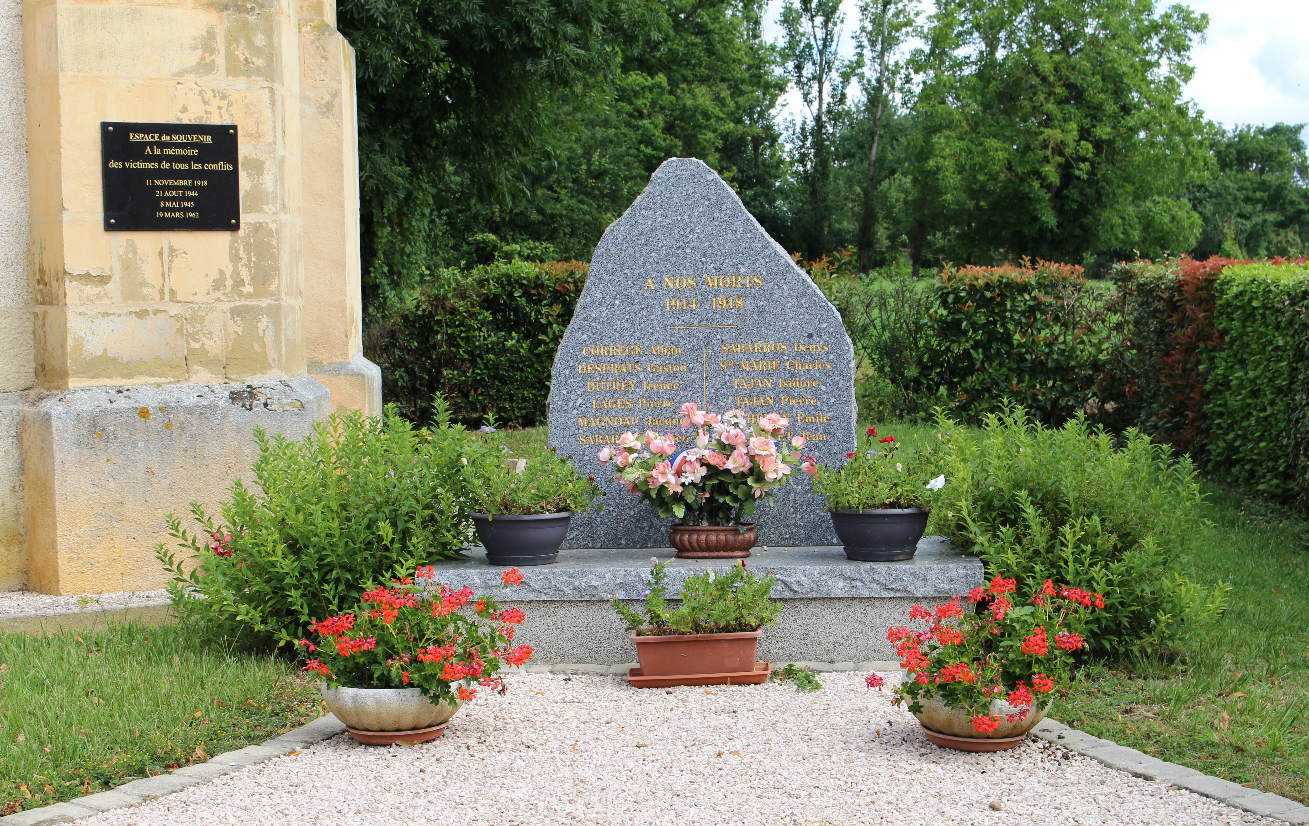 Monument aux morts de Devèze (Hautes-Pyrénées)